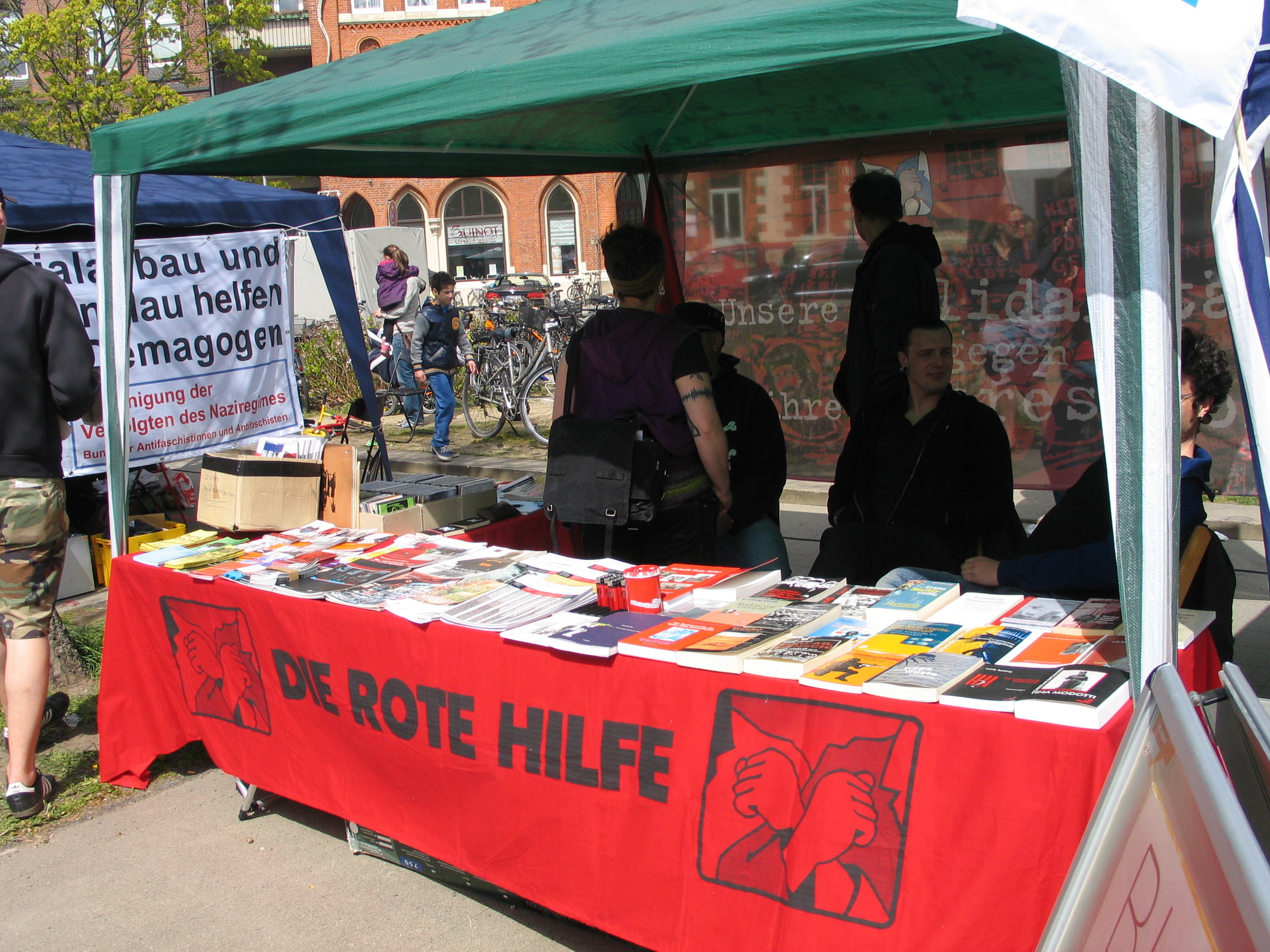 Unbearbeitetes, dafür zeitnah hochgeladenes Foto vom 1. Mai 2013 in Hannover: Der Deutsche Gewerkschaftsbund hatte zu den Demonstrationen unter dem Motto "Gute Arbeit. Sichere Rente. Soziales Europa" aufgerufen. Vielleicht letztmals zogen Demonstranten und unterschiedlichste Gruppierungen vom Freizeitheim Linden zum Klagesmarkt, den die Stadt Hannover im Zuge der Umbaumaßnahmen von Hannover City 2020 + demnächst mit Häusern bebauen will. Auch 2013 nahmen insbesondere Familien mit Kindern an den Feierlichkeiten teil und konnten vielleicht letztmals gleichzeitig in der Grünfläche des Gartendenkmals Alter St. Nikolai Friedhof Erholung finden ...